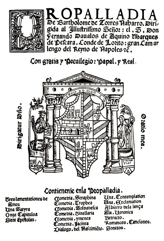 Portada de Propalladia, de Bartolomé Torres Naharro